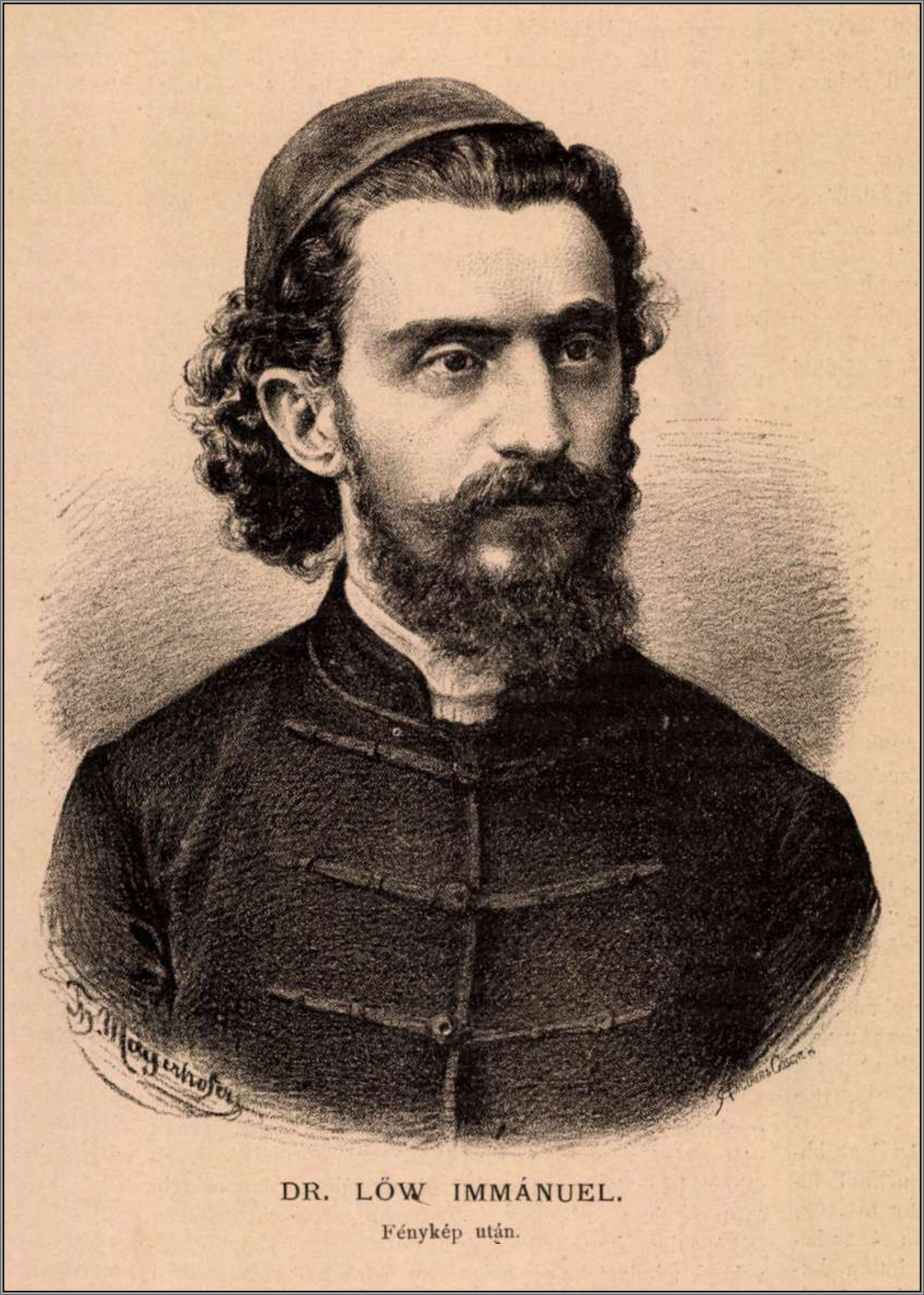 Lőw Immánuel (Ábrahám Hajím) (Szeged, 1854. január 20. – Budapest, 1944. július 19.) magyarországi zsidó hittudós, 1878-tól haláláig, 66 éven keresztül szegedi főrabbi, orientalista, művelődéstörténeti író.